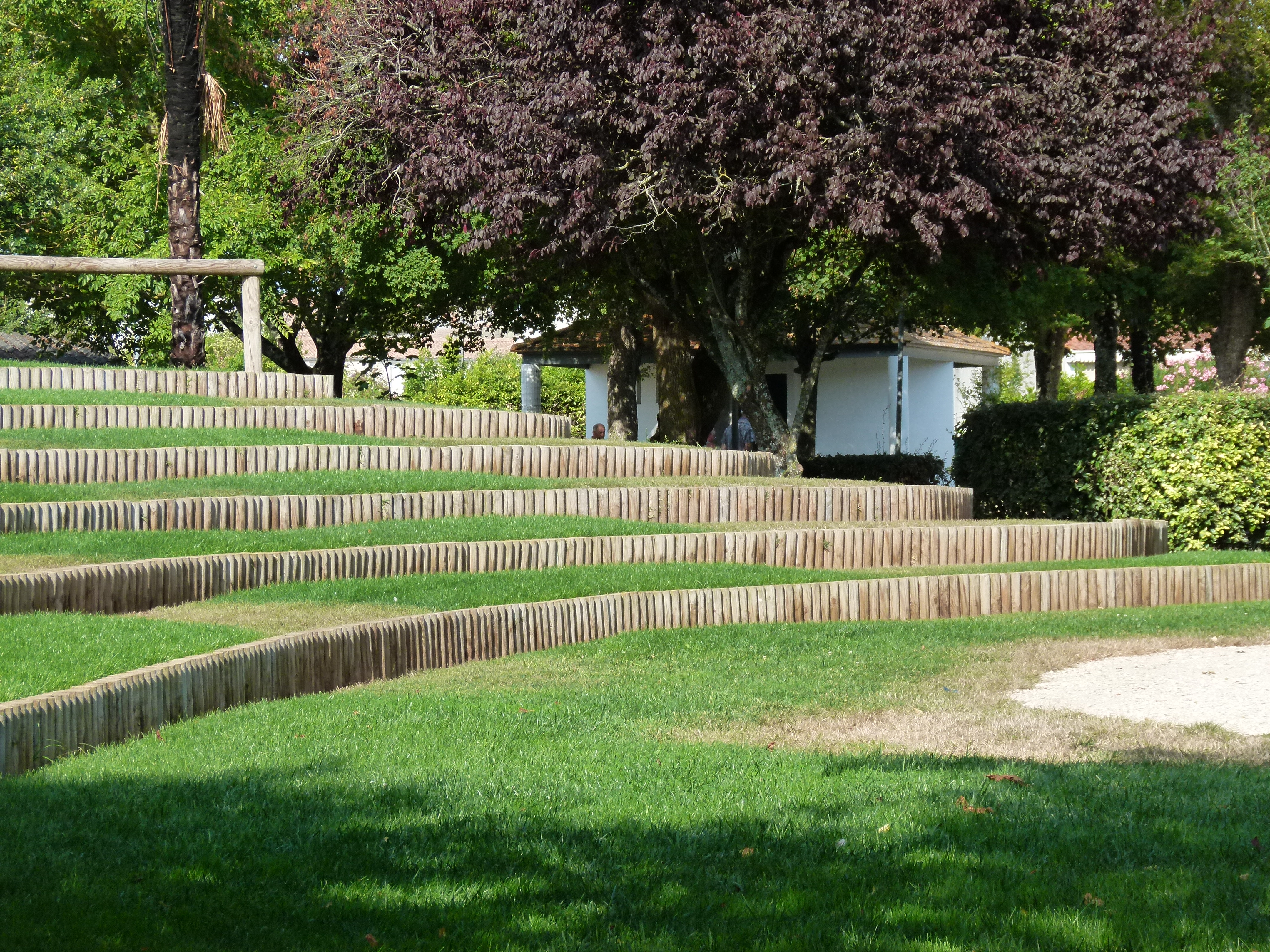 Le théâtre de verdure de Marennes est situé dans le jardin public de la ville et a été inauguré en 2010.